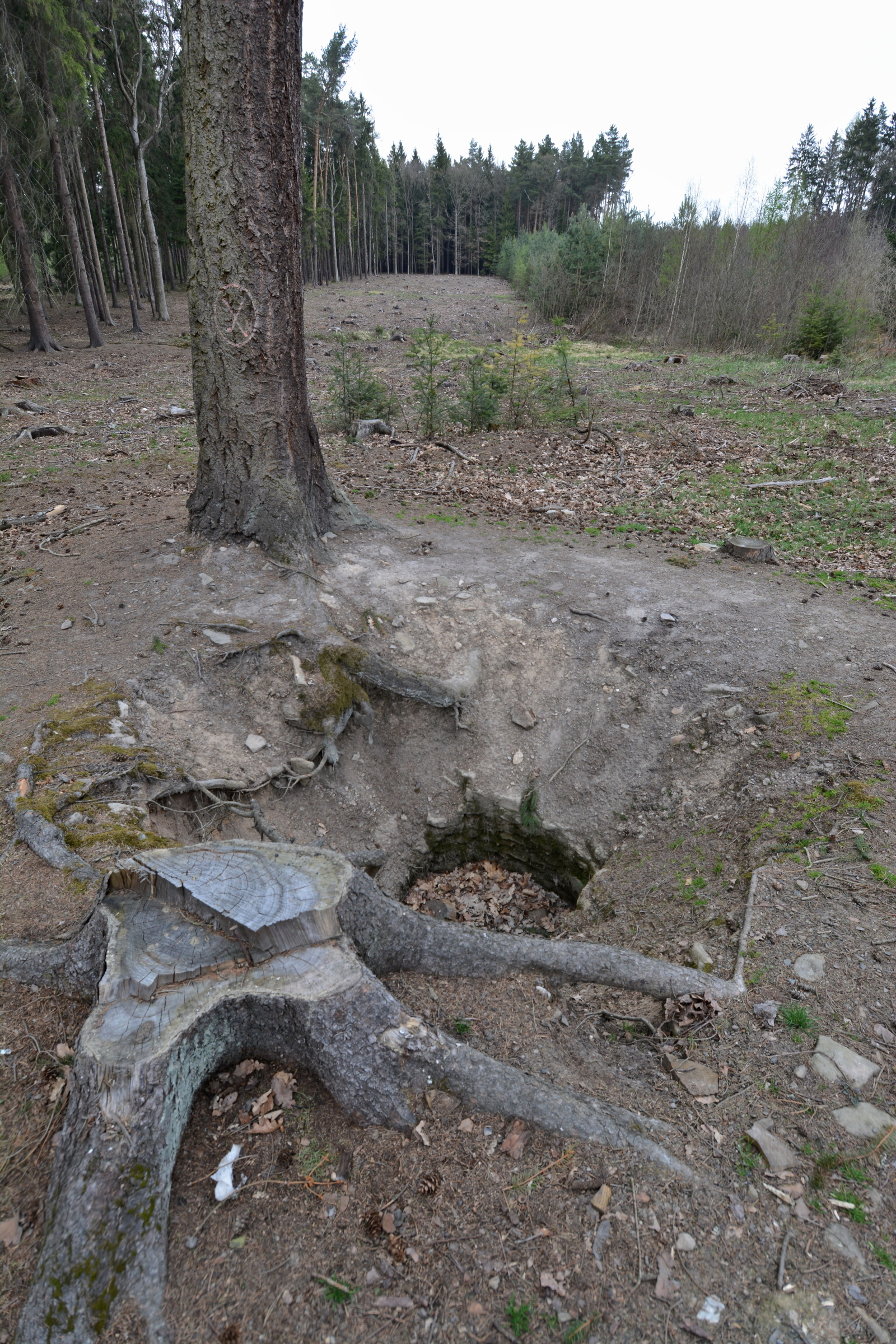 Zaniklá obec Hol v Klánovickém lese. Pozůstatky zděné studny.